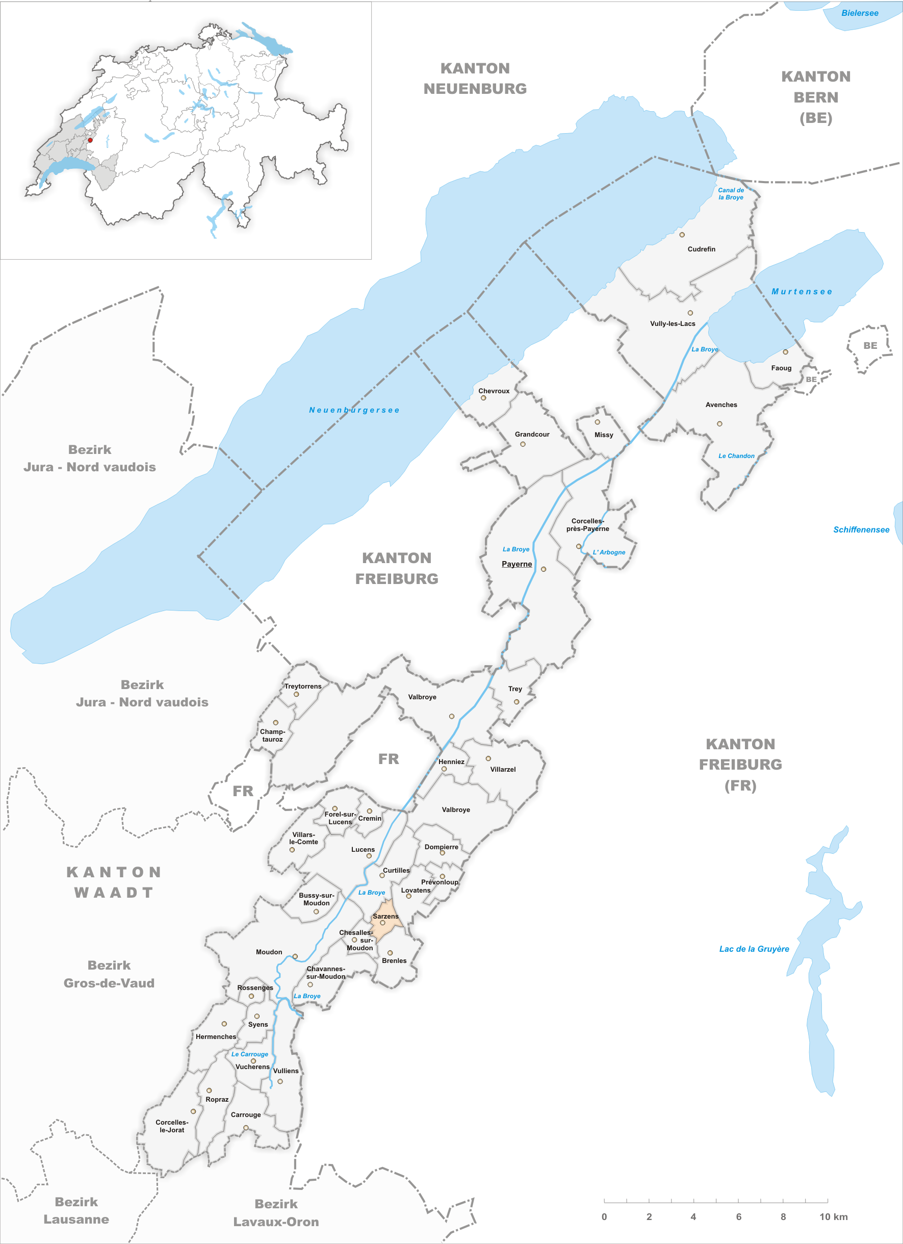 Municipality Sarzens